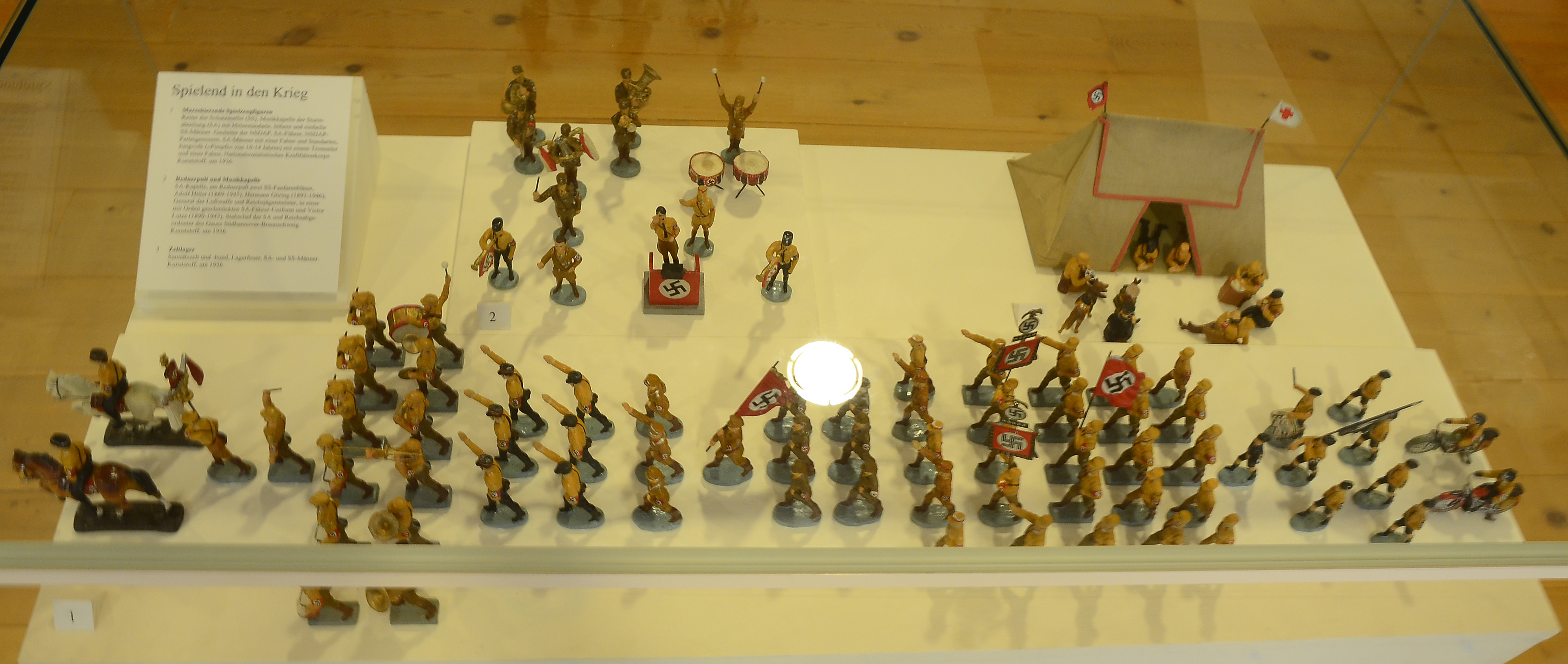 Braunschweigisches Landesmuseum, Dauerausstellung, (GLAM Juni 2014)